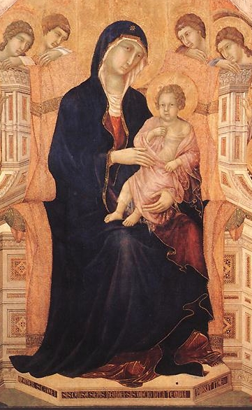 Duccio di Buoninsegna